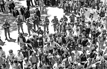 En plena dictadura, el sector ubaldinista de la CGT convocó a una huelga general para el día 7 de noviembre de 1981 mientras que el sector de Triaca se negó a adherir. Una multitud se congregó en la Iglesia de San Cayetano, en Liniers, bajo la consigna “paz, pan y trabajo”, acompañados por Ubaldini que era el Secretario General de la CGT-Brasil; finalizó con represión